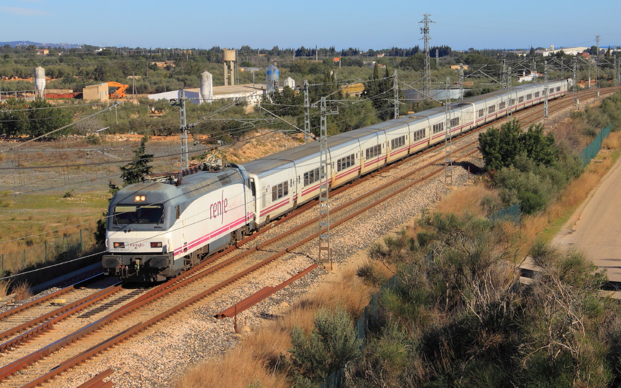 La locomotora eléctrica 252.075 de Renfe Operadora, con un servicio Talgo Barcelona Sants - Murcia del Carmen, entrando en la estación de L'Aldea - Amposta - Tortosa (Baix Ebre, Tarragona, Catalunya)